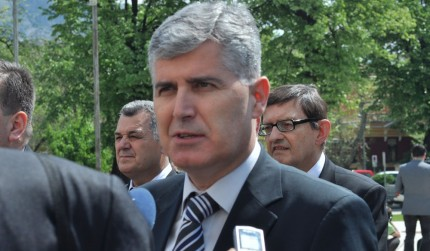 Dragan Čović